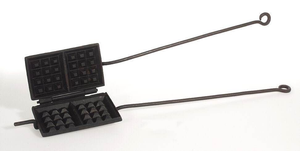 Waffeleisen